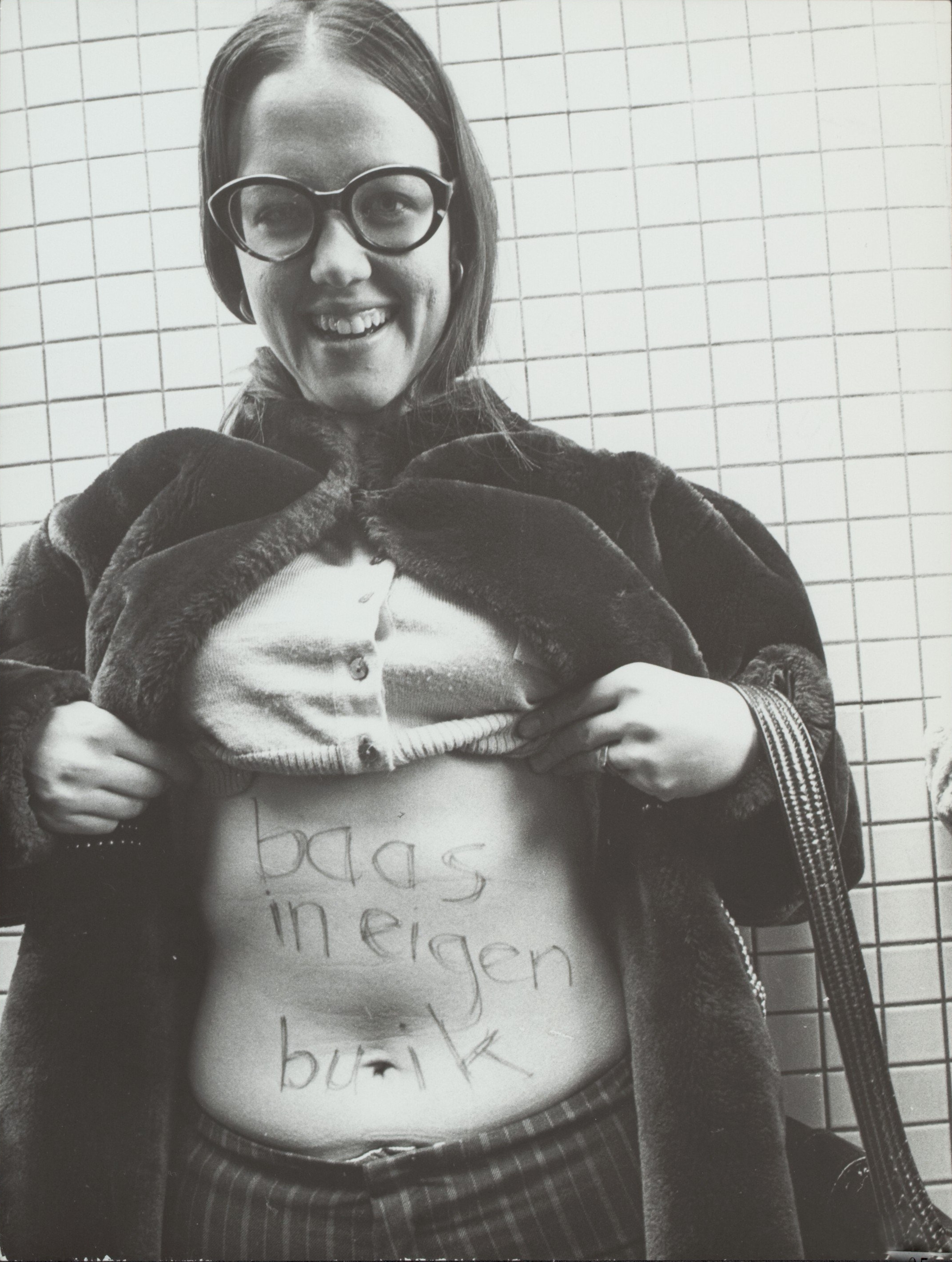 Collectie / Archief : Fotocollectie Rijksvoorlichtingsdienst Eigen Reportage / Serie : [ onbekend ] Beschrijving : Aktie "Baas in eigen buik". Een vrouw laat zien wie de baas is in eigen buik. Annotatie : Aankoop foto: 15-7-1971 Datum : ongedateerd Trefwoorden : akties, dollemina's, protesten Persoonsnaam : baas in eigen buik, dollemina Fotograaf : Fotopersbureau 't Sticht / Anefo, [onbekend] Auteursrechthebbende : Nationaal Archief Materiaalsoort : Foto (zwart/wit) Nummer archiefinventaris : bekijk toegang 2.24.10.02 Bestanddeelnummer : 119-0598